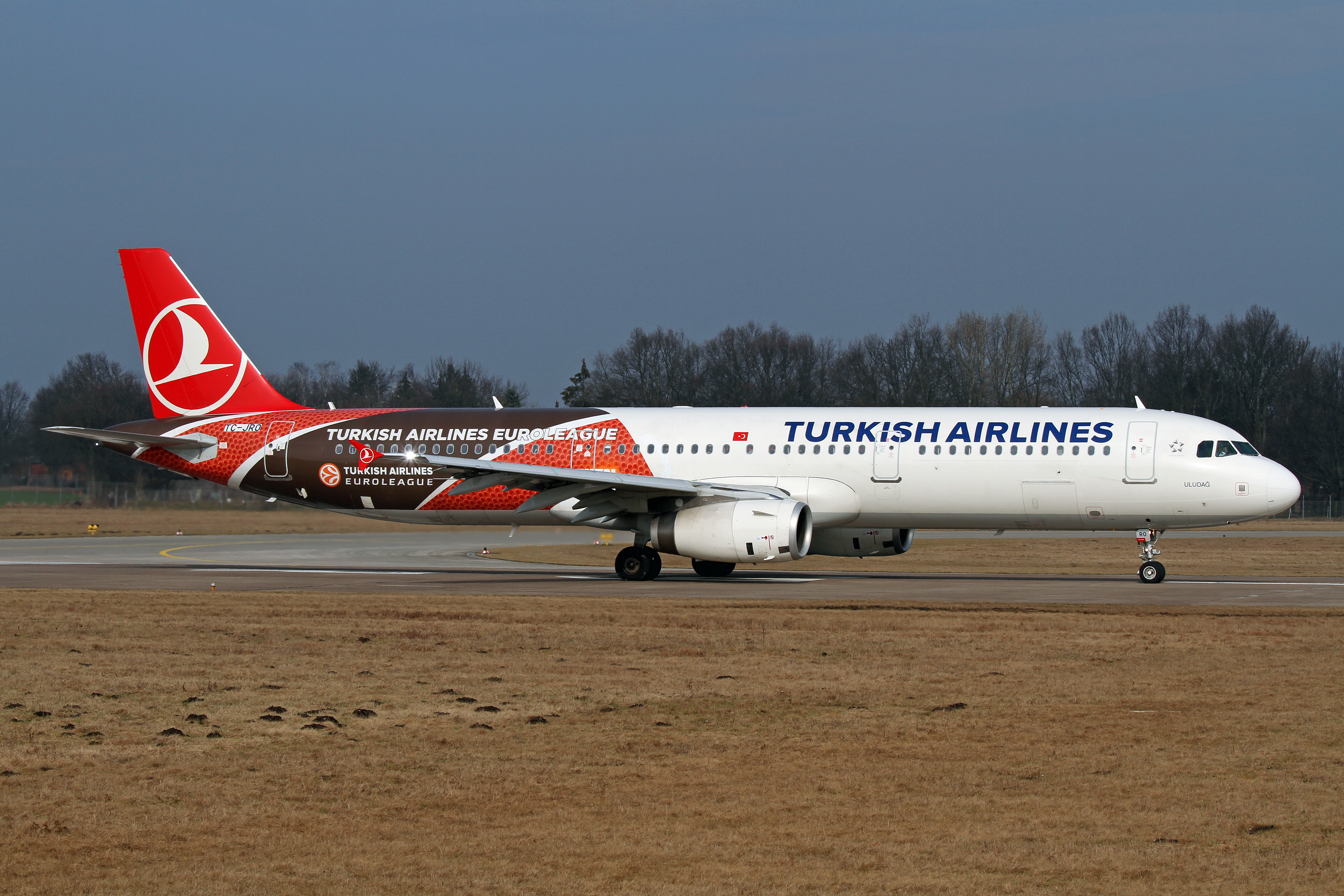 HAJ/EDDV 03-03-12